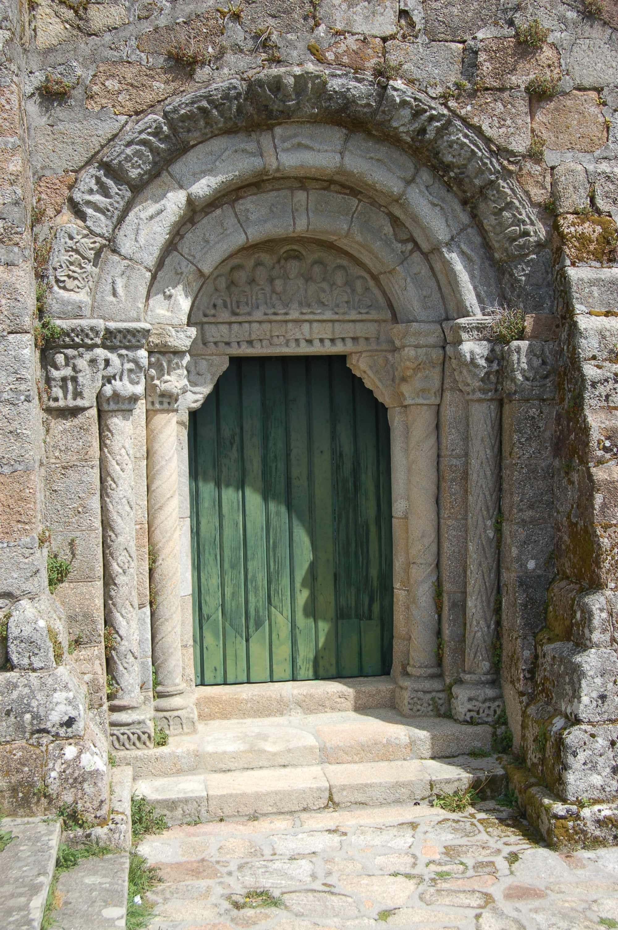 Porta lateral da igrexa de San Xulián de Moraime, en Moraime (Muxía).